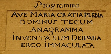 Lateinisches Anagramm am Barockportal der Gymnasialkirche Meppen:AVE MARIA GRATIA PLENA DOMINUS TECUM - "Sei gegrüßt, Maria, voll der Gnade, der Herr ist mit dir" (Engelsgruß).INVENTA SUM DEIPARA ERGO IMMACULATA - "Ich wurde zur Gottesgebärerin ersehen, daher (bin ich von der Erbsünde) unbefleckt".